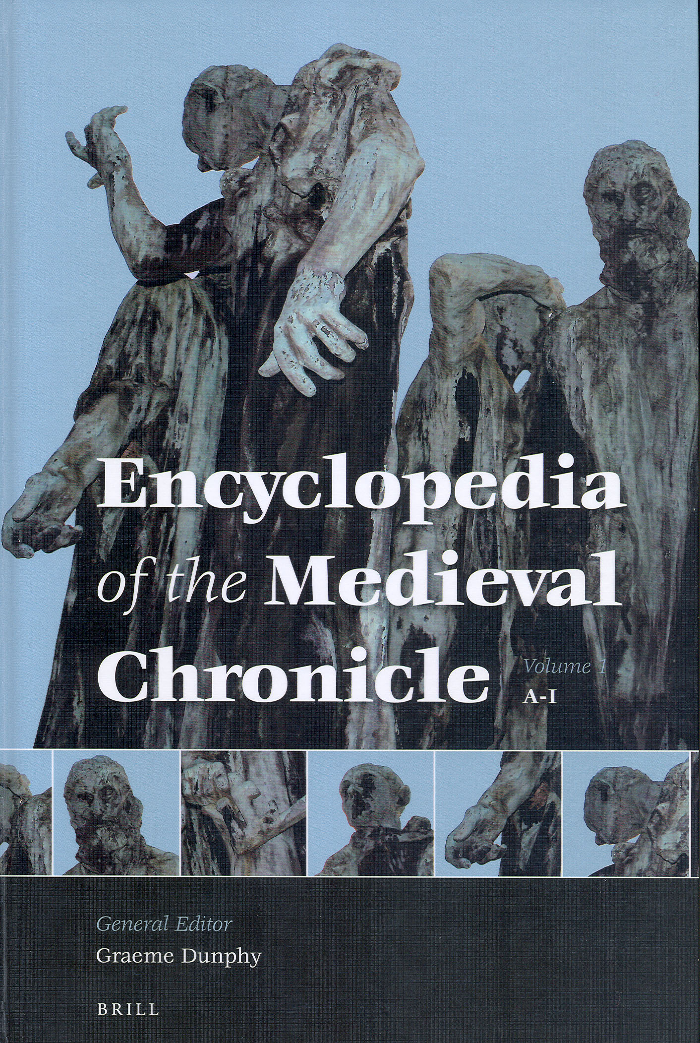 Buchumschlag